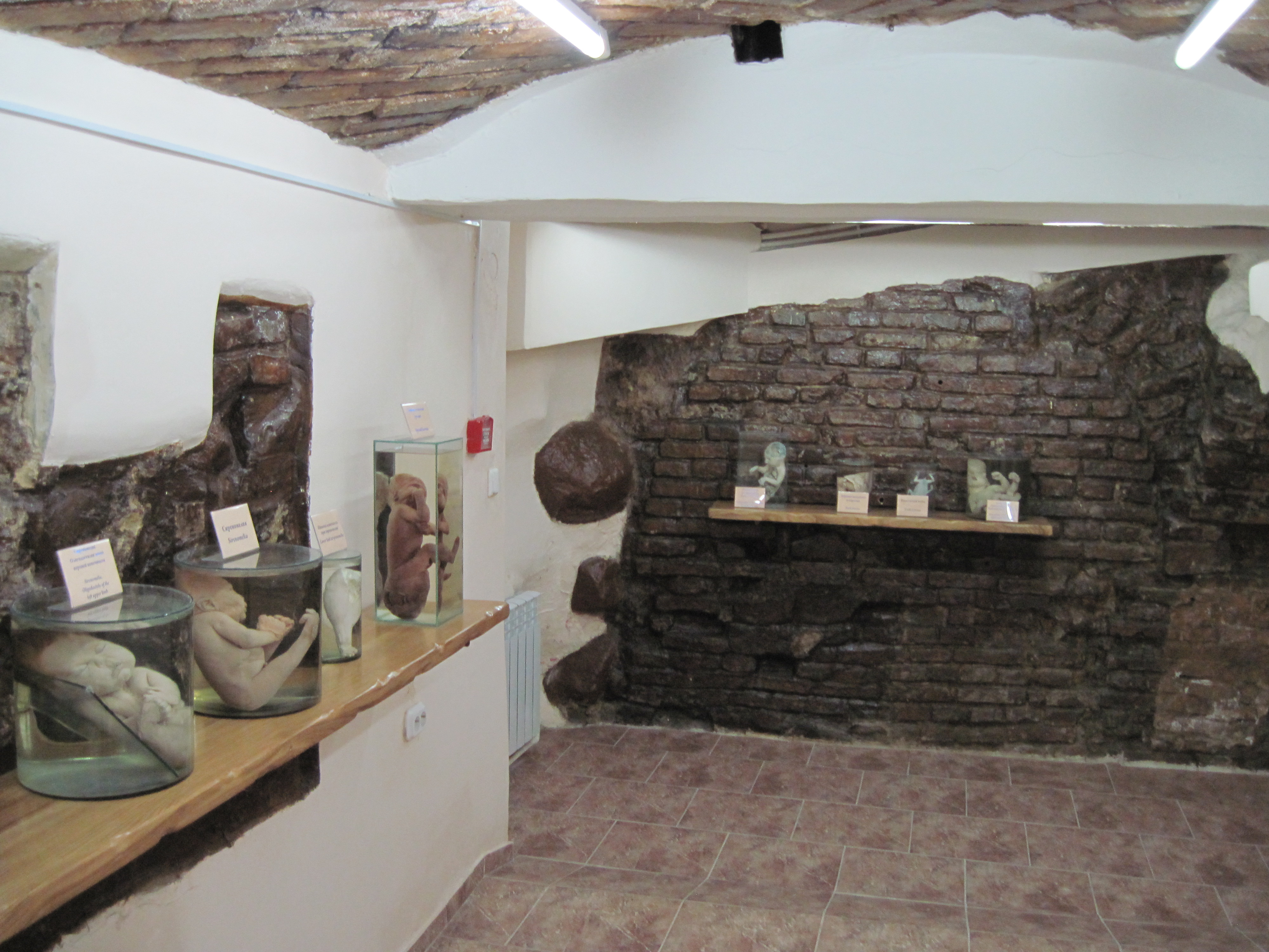 Экспазіцыя музея пачварнасцяў чалавечечага цела (Гродзенская кунсткамера) у палацы Сапегаў